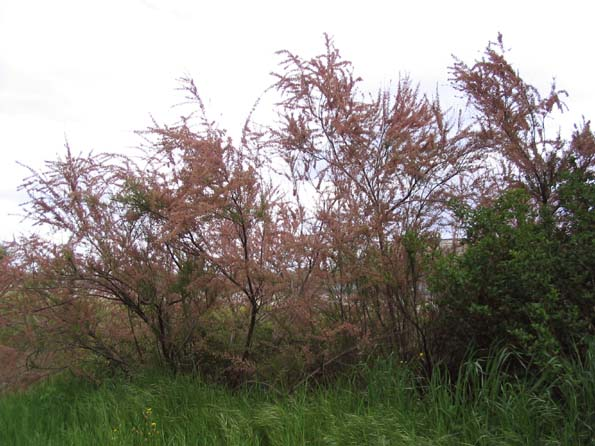 Groupe de tamaris Photo Jean Tosti (Ille-sur-Tet, 27/04/04)